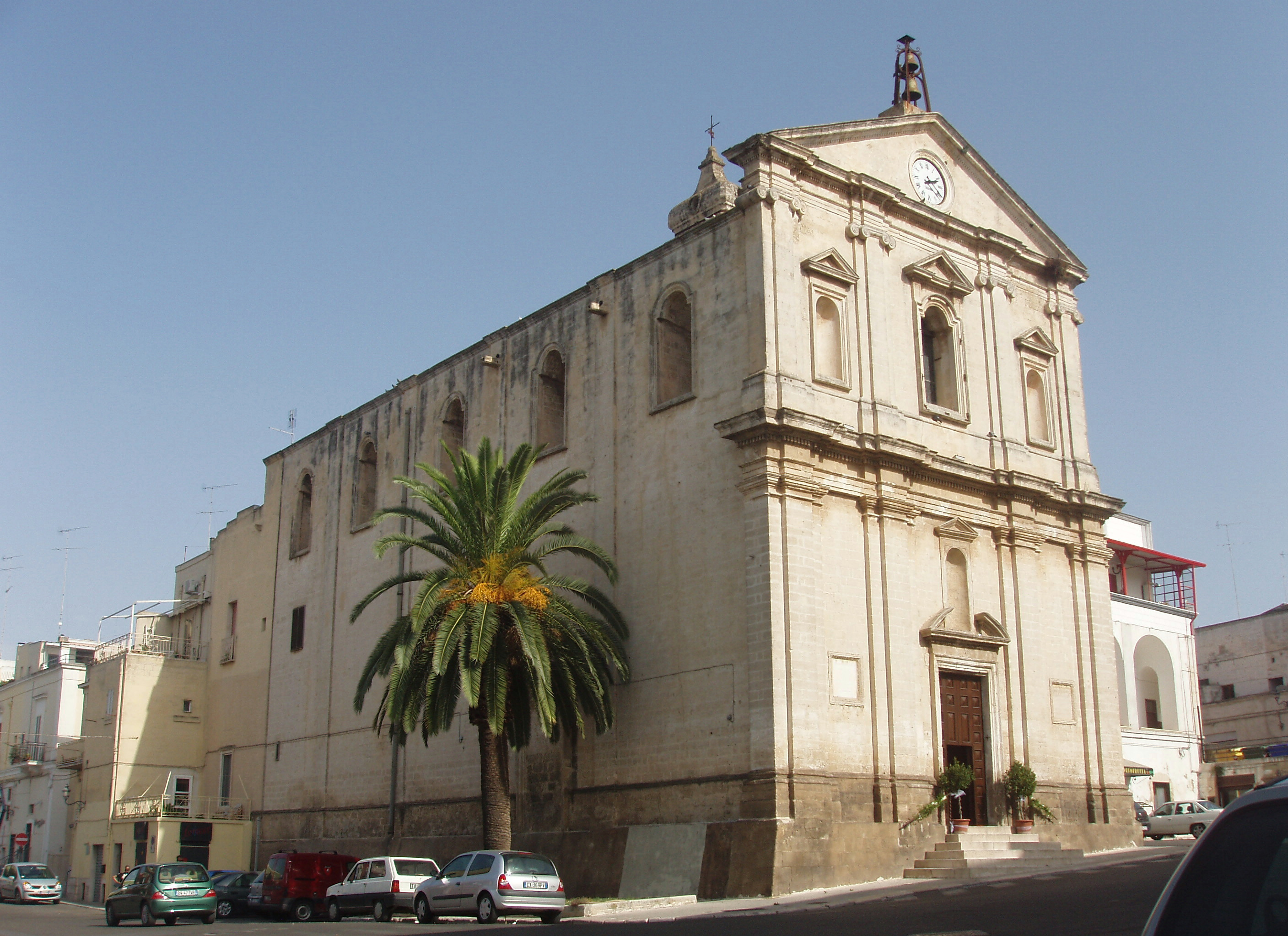 Chiesa S. Michele - Castellaneta